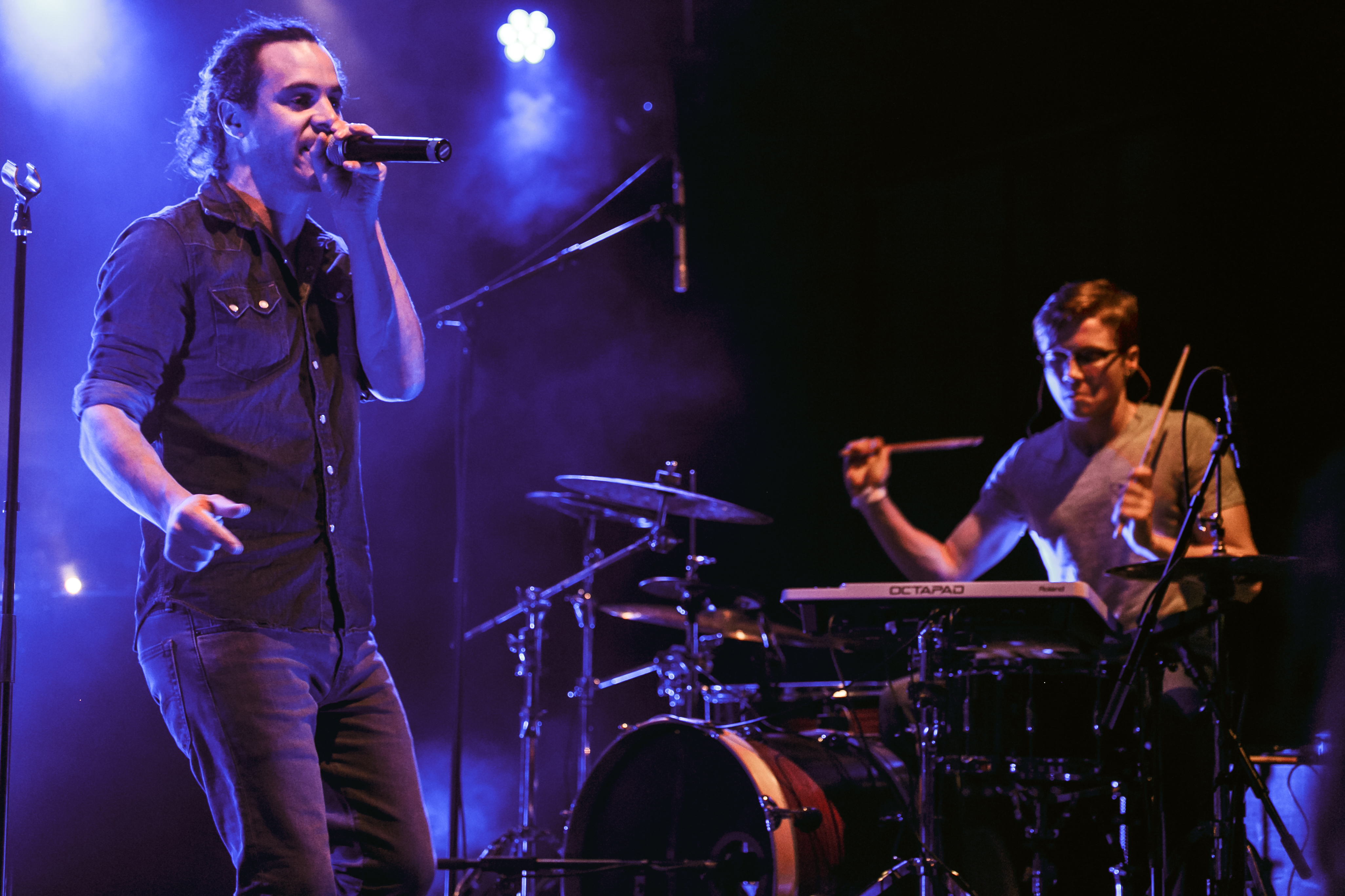 Krismenn en concert au Novomax dans le cadre du festival de Cornouaille à Quimper le 19 juillet 2017.